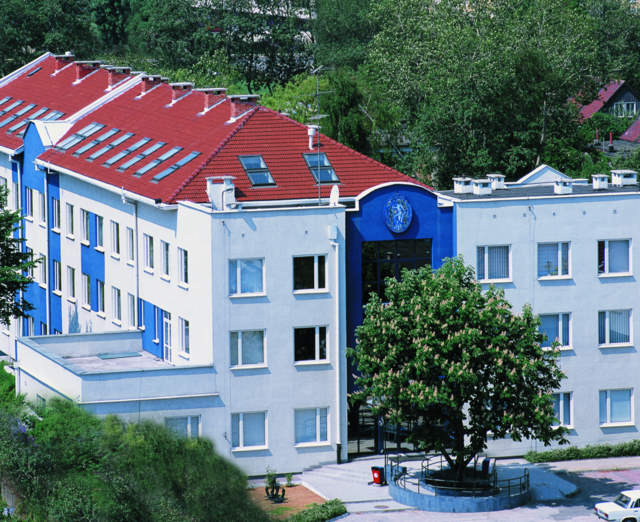 Siedziba Polskiego Rejestru Statków S.A. w Gdańsku, Al. Gen. Józefa Hallera 126.